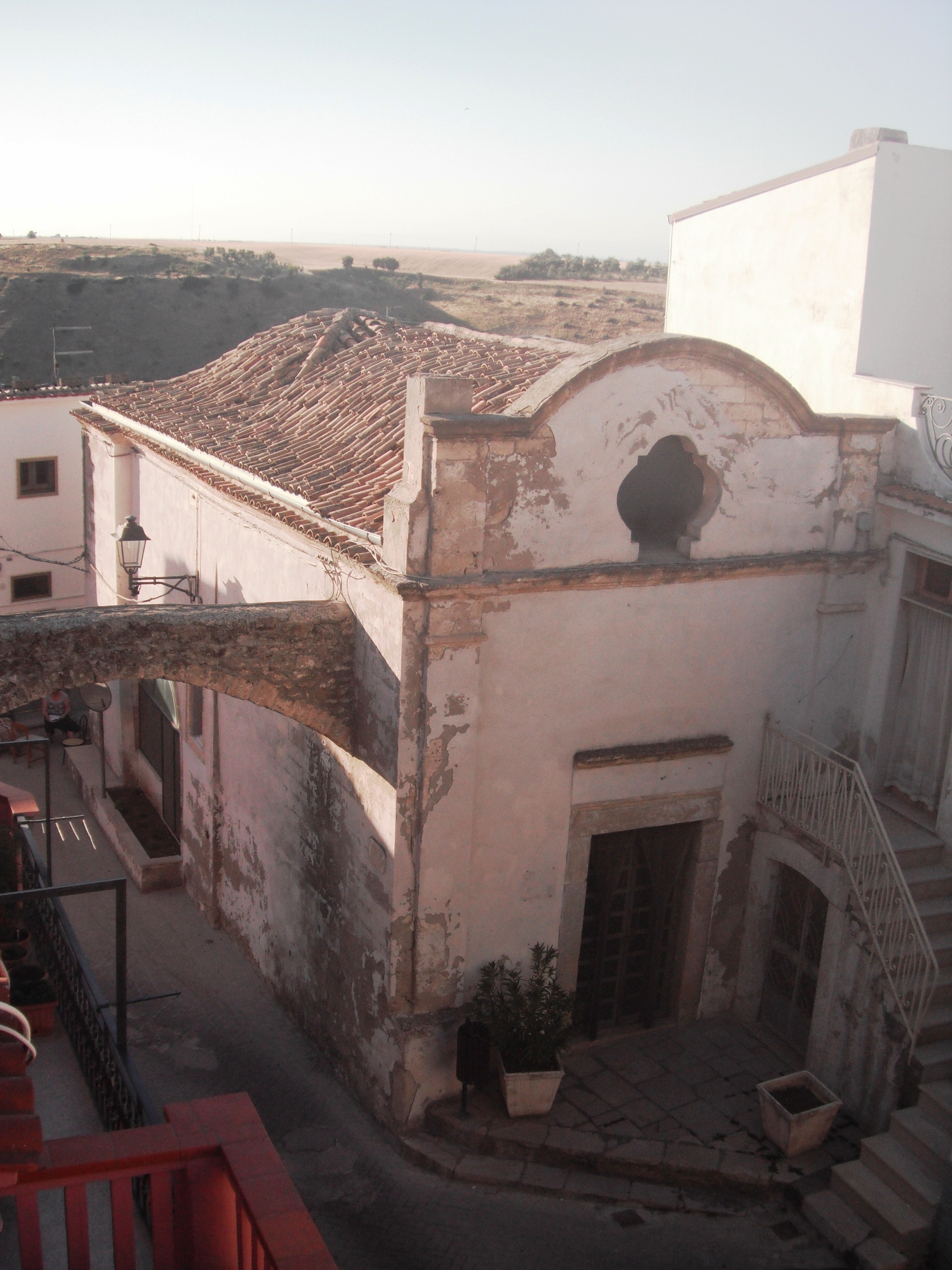 Ex chiesa del Purgatorio